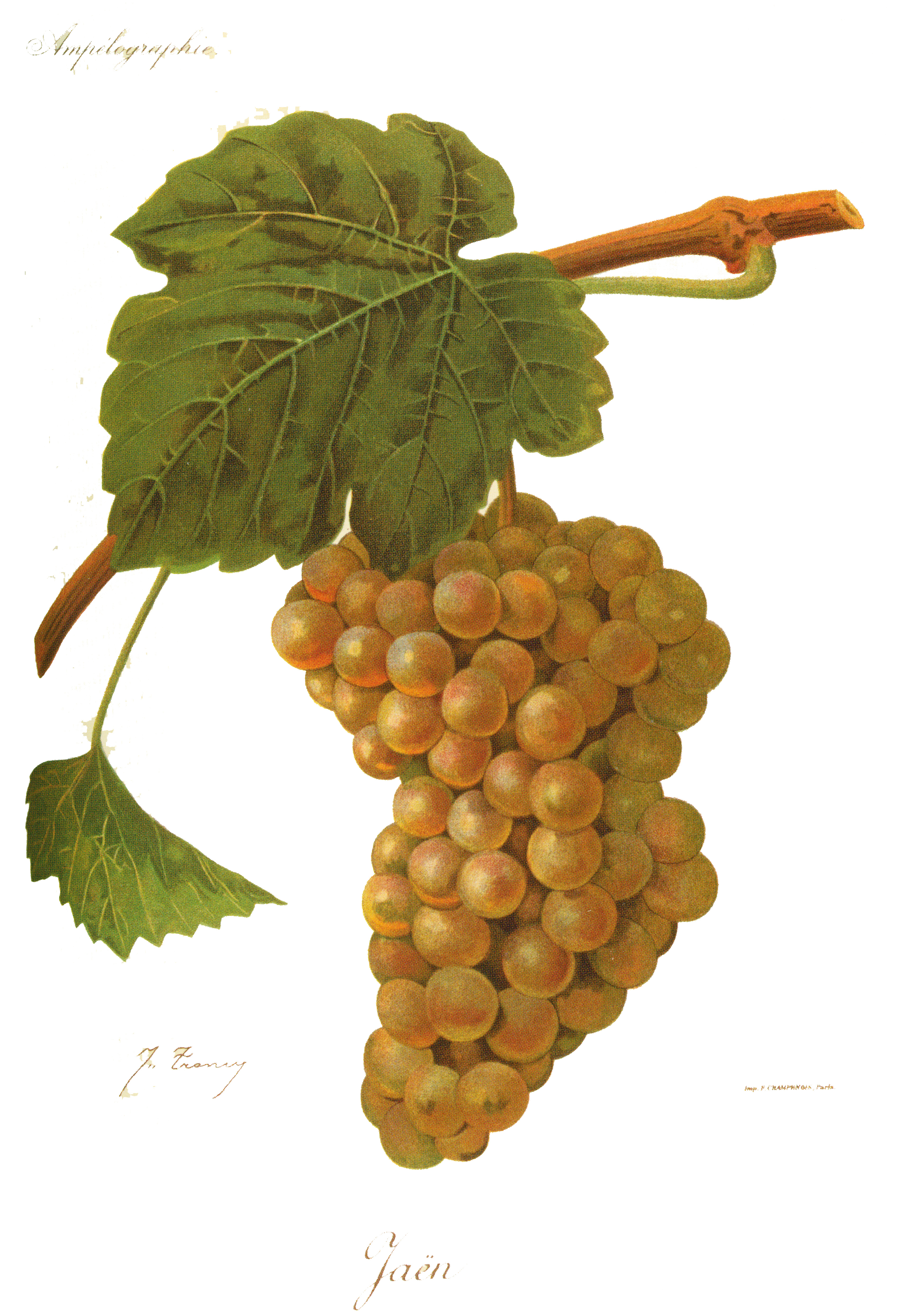 Cayetana Blanca w L'Ampélographie Viali i Vermorela (1901-1910).